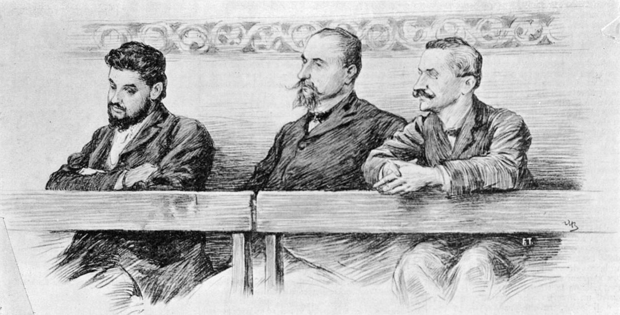 Filippo Turati, Oddino Morgari e Luigi De Andreis durante il processo a Milano nel 1898